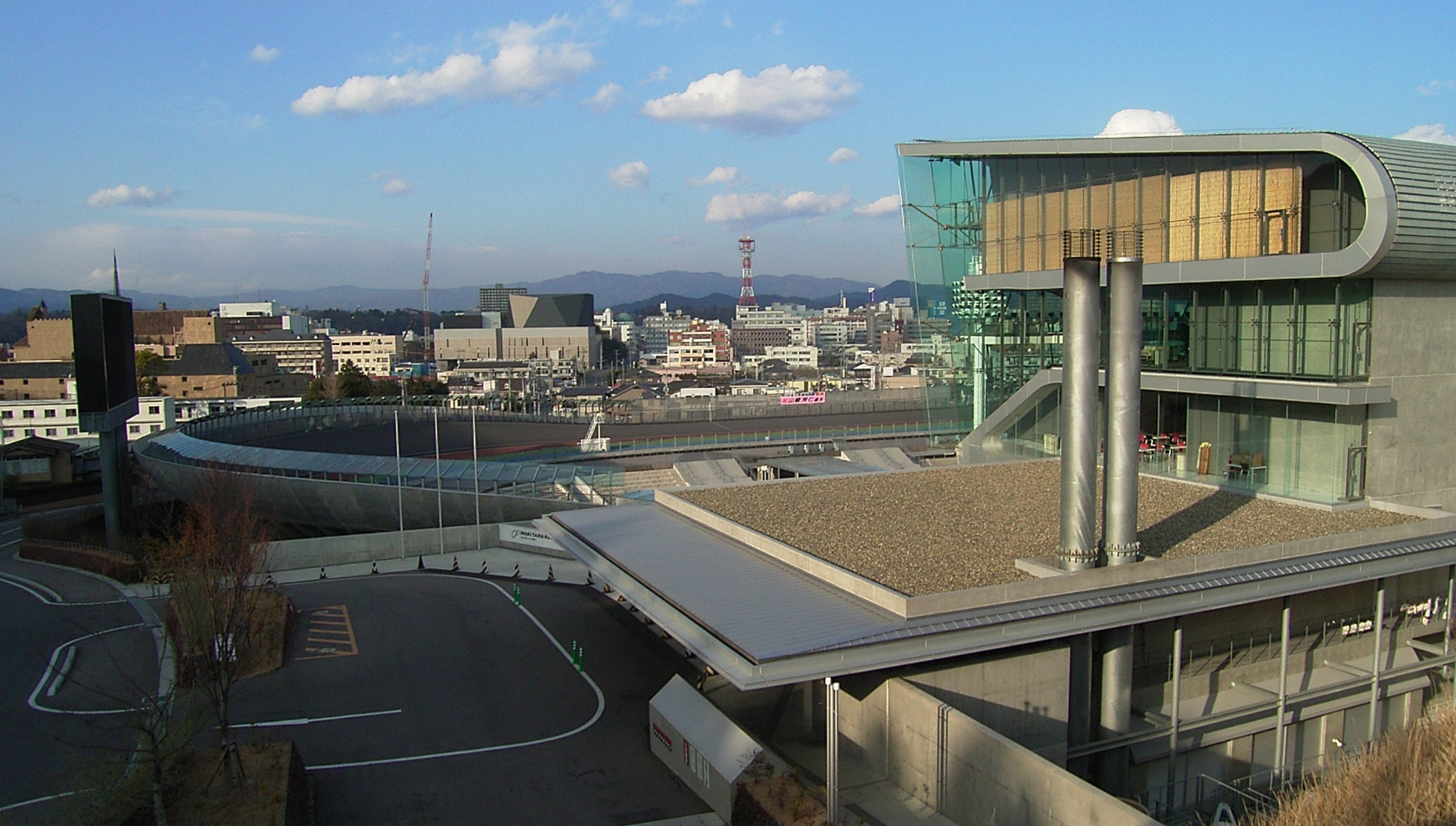 IwakiCity iwaki Tairakeirin いわき市 手前がいわき平競輪場といわき市内を望む。